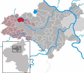 Kirchwald in Rhineland-Palatinate - district Mayen-Koblenz